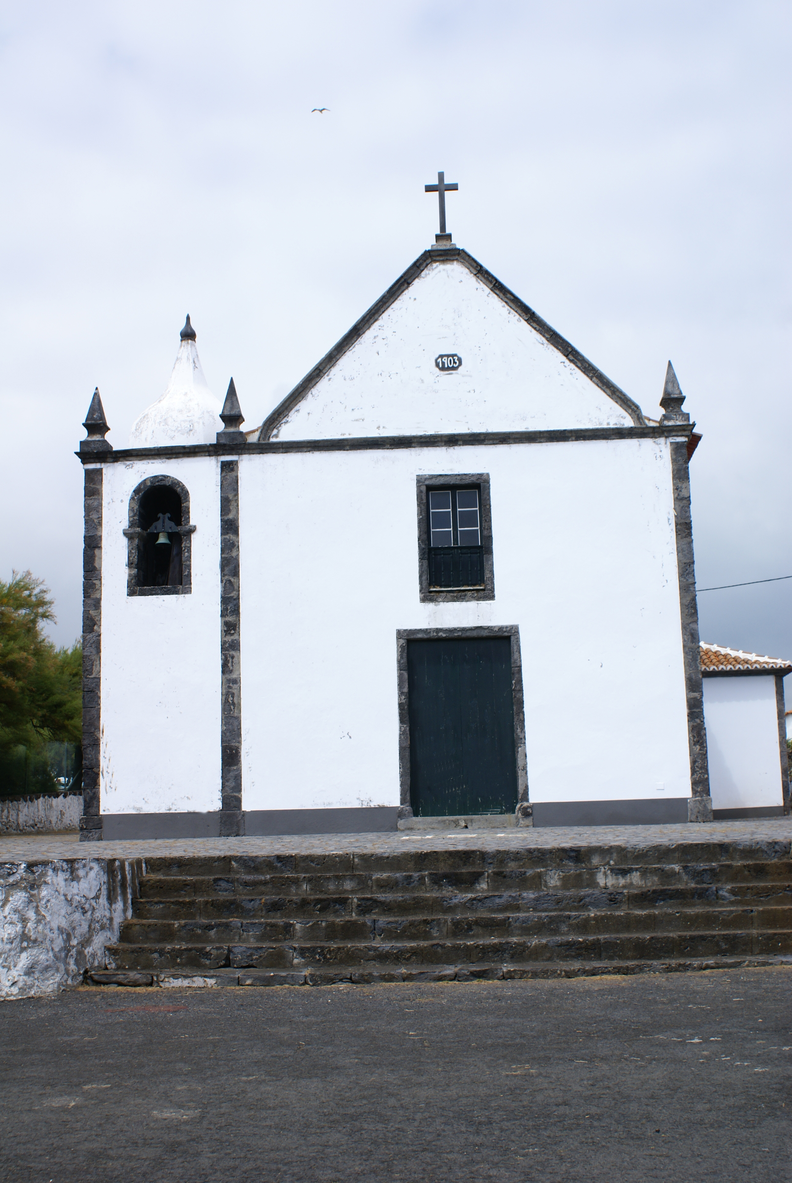 Ermida de Nossa Senhora de Lurdes, Porto das Cinco Ribeiras, Angra do Heroísmo, Açores